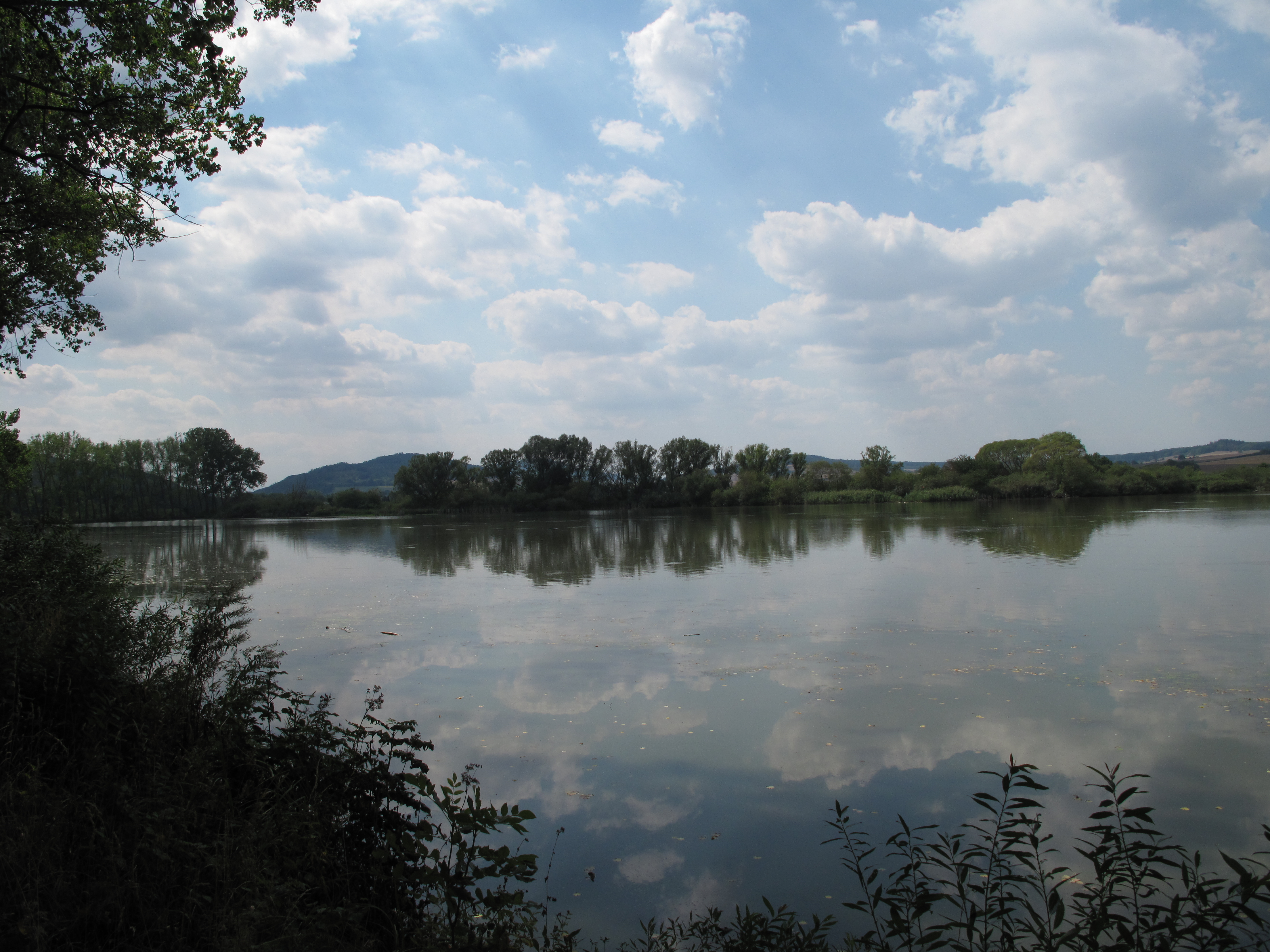 Plocha Lužanského rybníka. Okres Plzeň-jih, Česká republika.